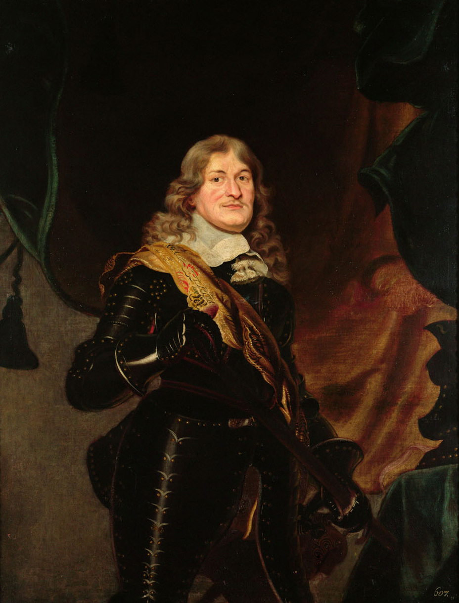 Kniestück